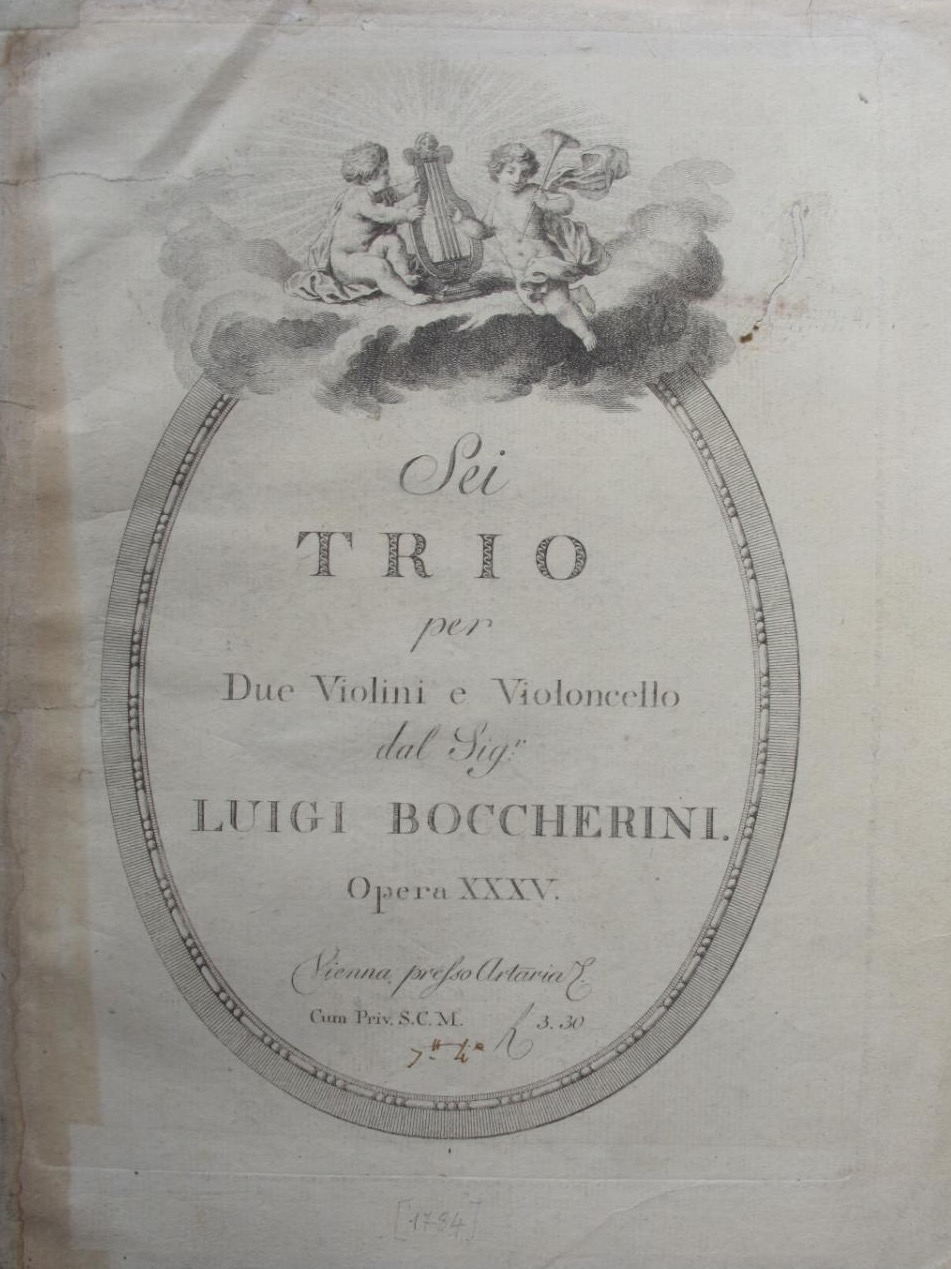 Boccherini, Artaria String trios opus 35 (1784).